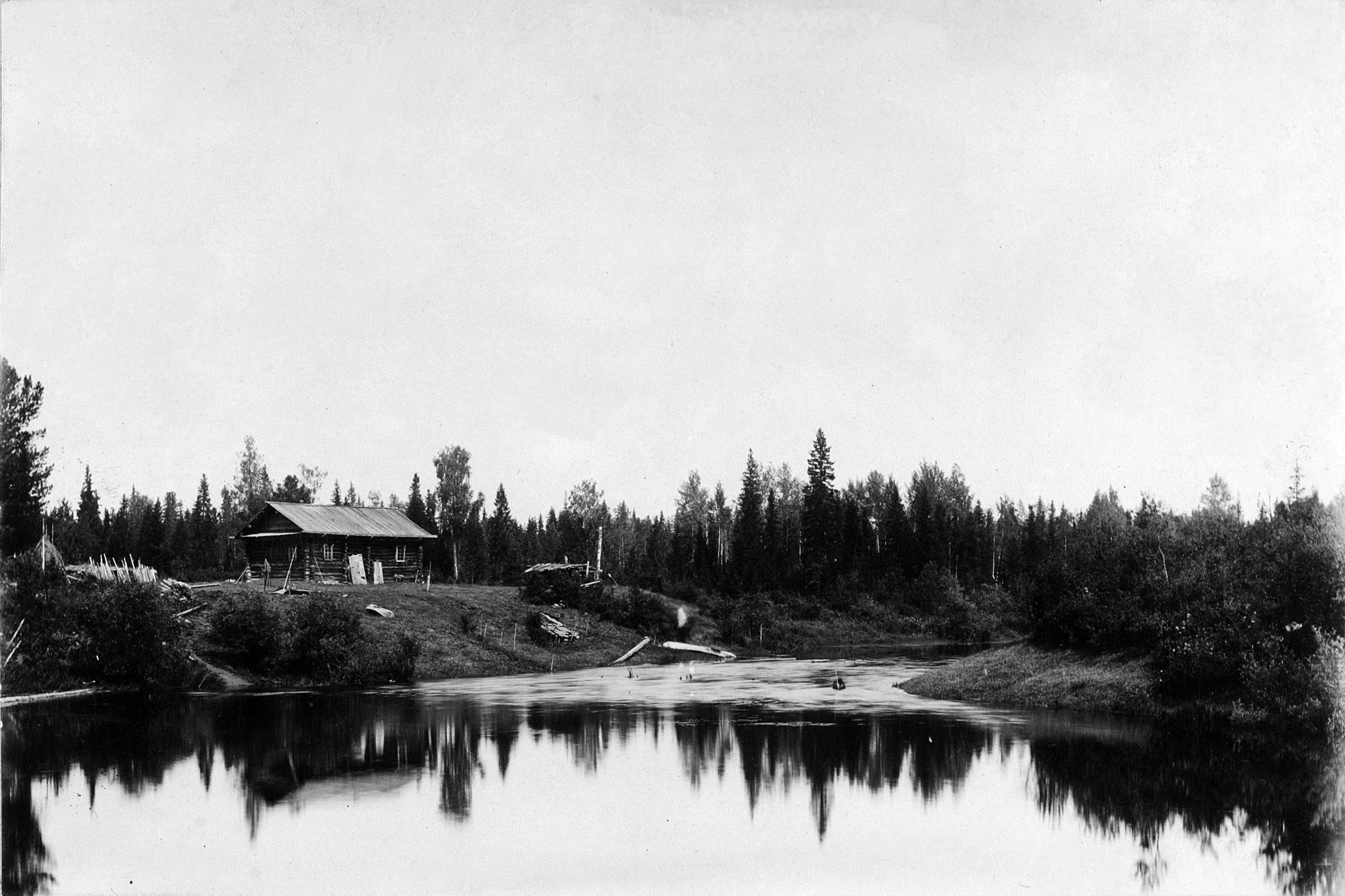 Хибара охотника во владениях графа Шувалова (250 000 десятин). Южная Кельтма. 1890.